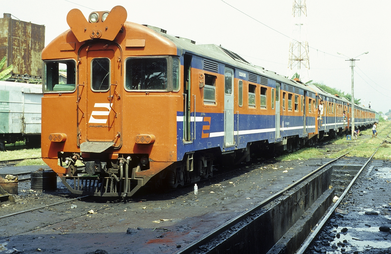 PTKA KRD (B)